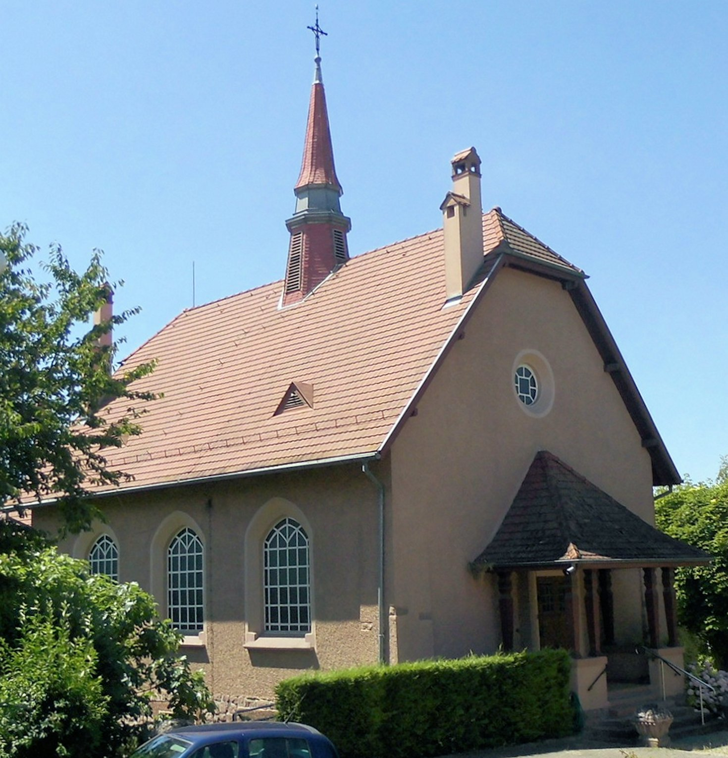 Le temple protestant de Riedisheim